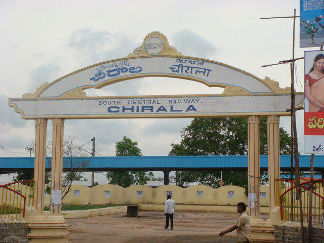 Chirala train station, Prakasam district, Andhra Pradesh